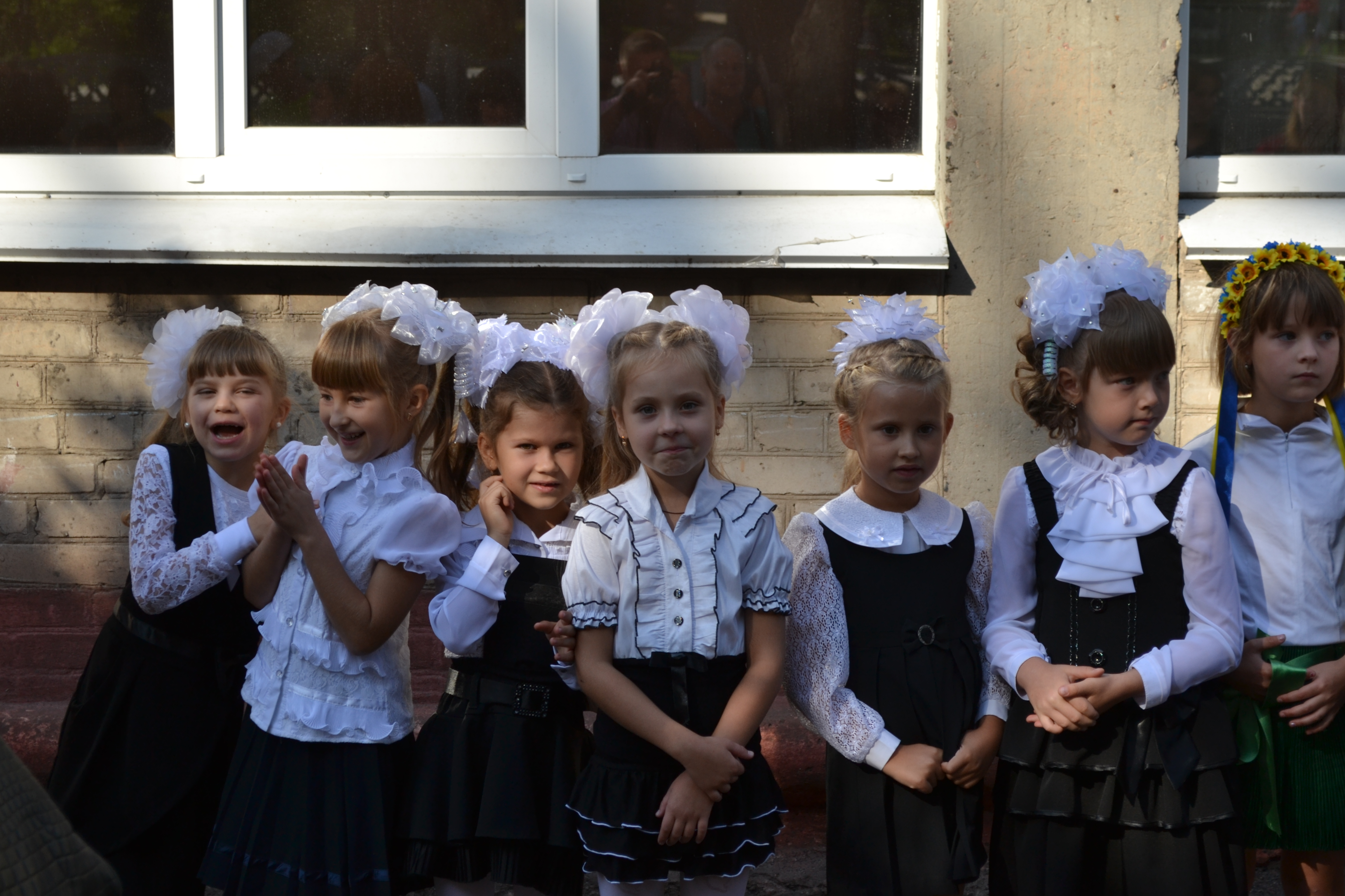 1 Вересня!